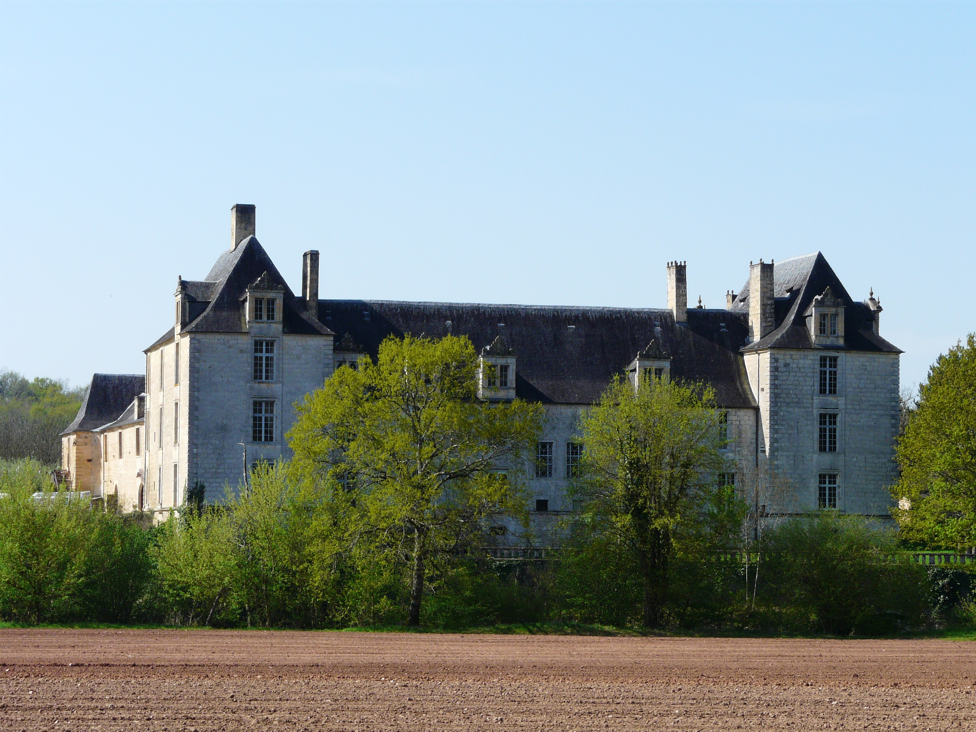 La façade nord du château de Sauvebœuf, Aubas, Dordogne, France